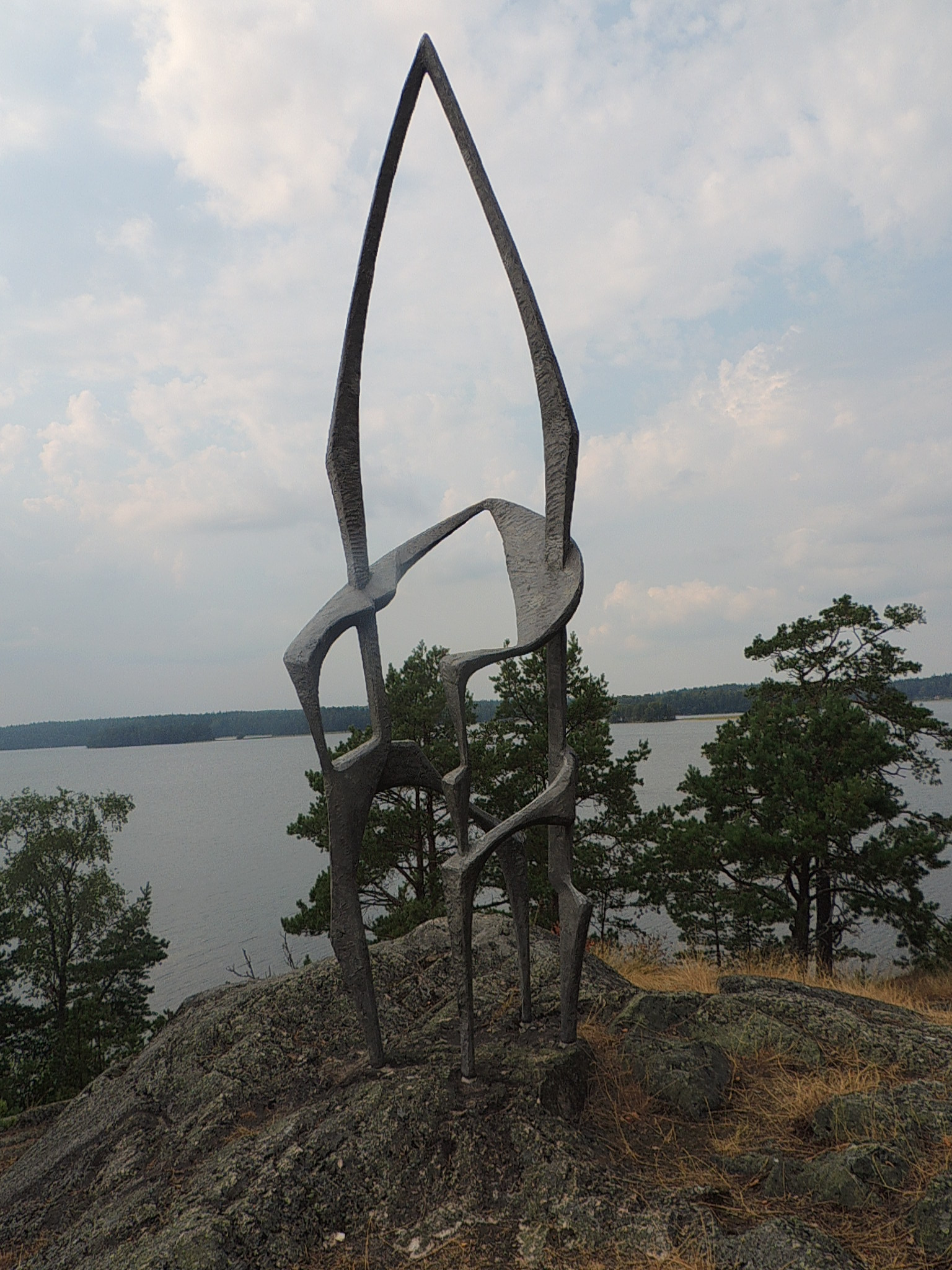 Arne Jones skulptur Katedral på Bommersviks gård.